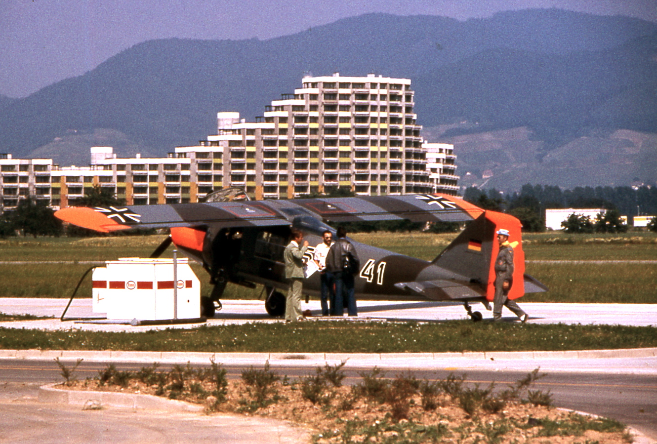 Offenburg Flugplatz (EDTO) im Jahr 1977. Flugbewegungen im Zusammenhang mit dem Anfliegen Offenburgs als Etappenziel des Deutschlandfluges 1977. Dornier Do-27 der Bundeswehr 56+41 an der Takstelle. Im Hintergrund der 'Bumerang'.